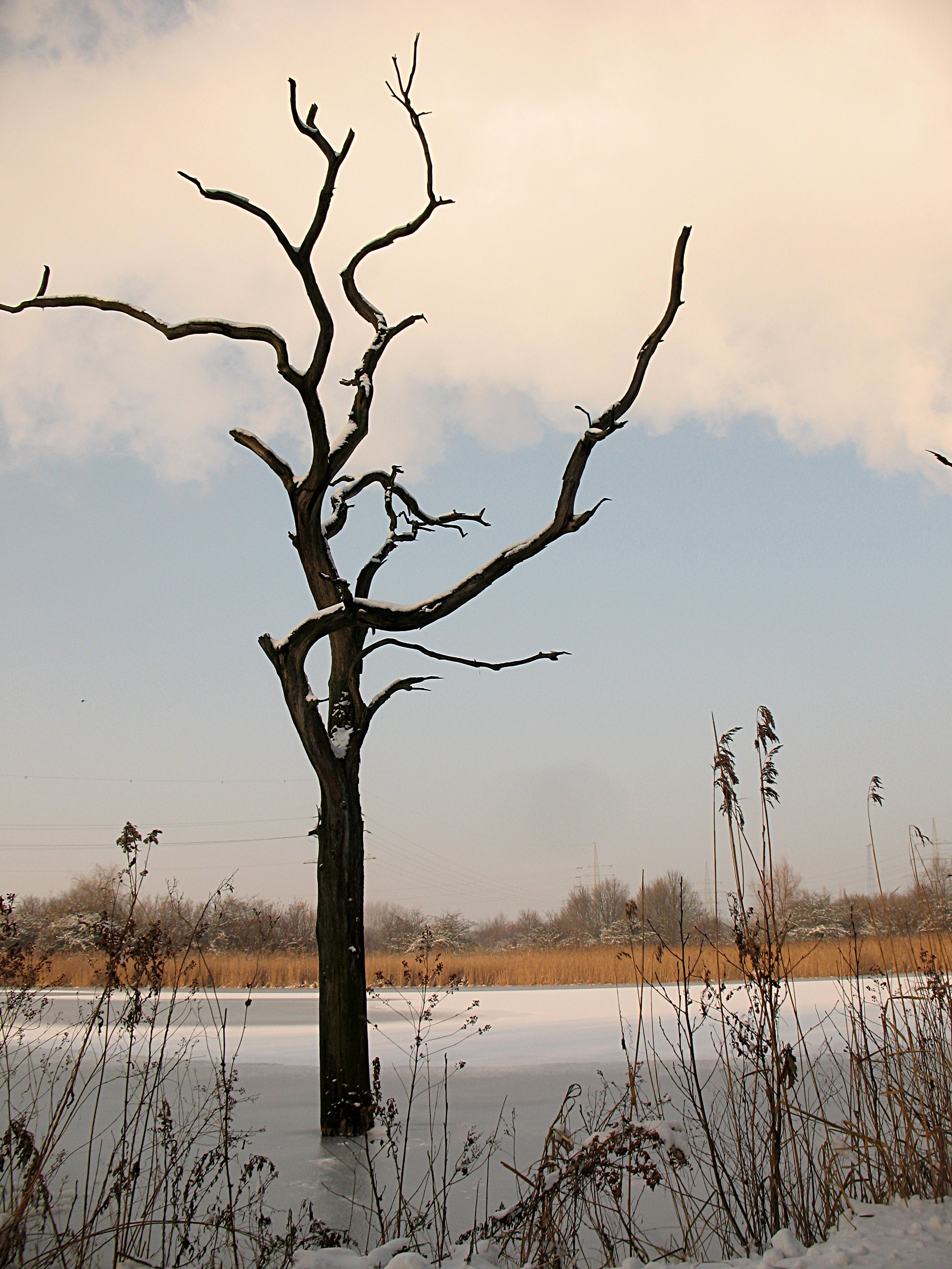 Bergbau-Senkungsgebiet am Tibaum in Hamm (NRW, Naturschutzgebiet HAM-006)